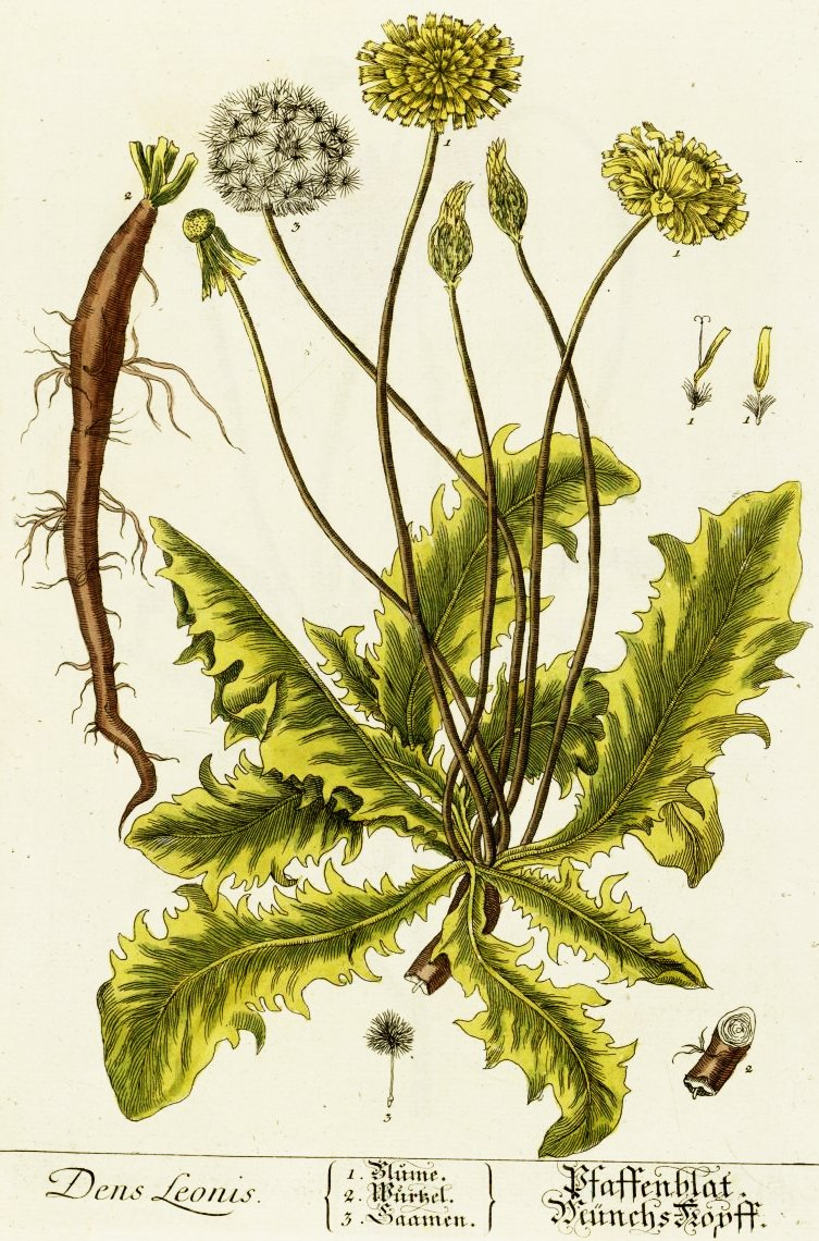 dandelion